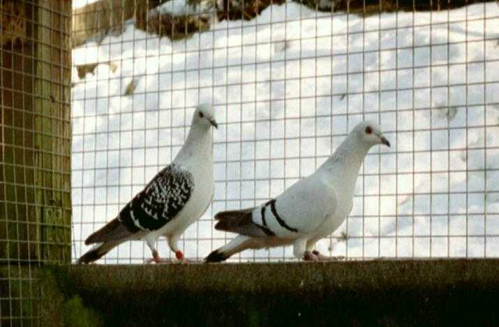 Eistaube, gehämmert und Eistaube, schwarzbindig (Taubenrasse)